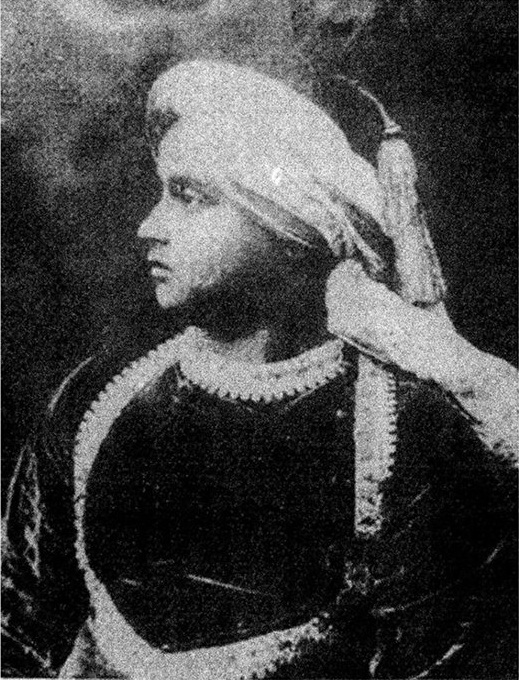 The Young Nababa Salimullah in 1880.